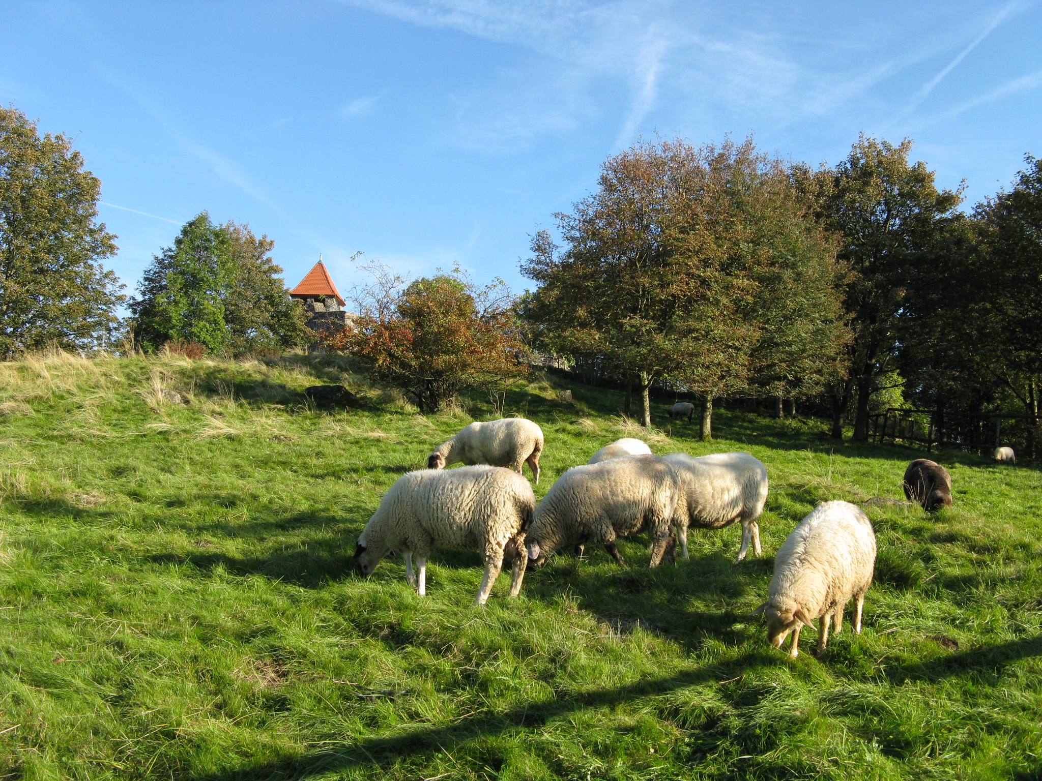 Sheep near Ulrichstein castle, Vogelsberg/Germany